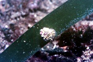 Gibbula ardens Note: it is more or less impossible to tell what this is at this low resolution, but I think it is not a Gibbula snail.